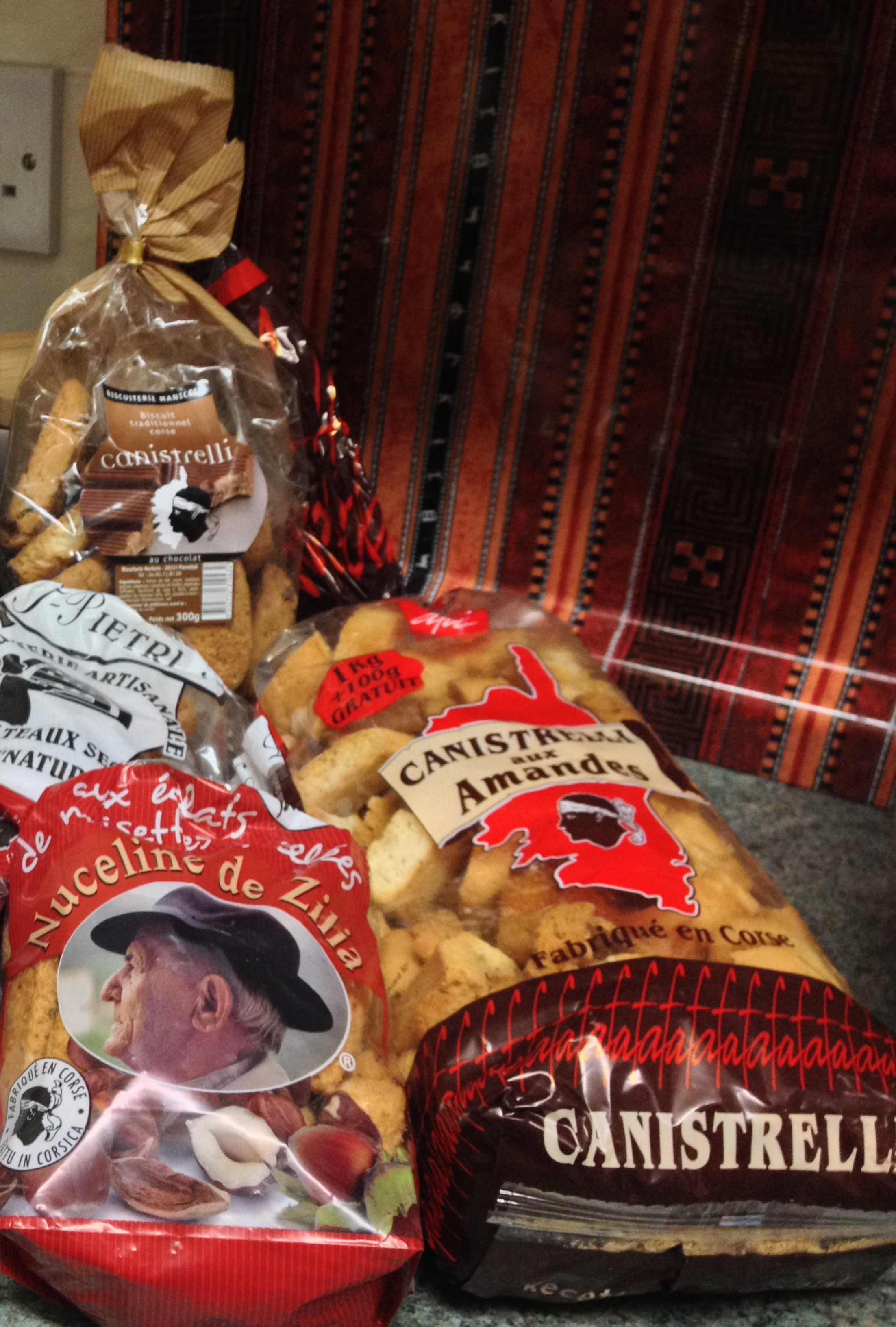 Canistrelli en sachets